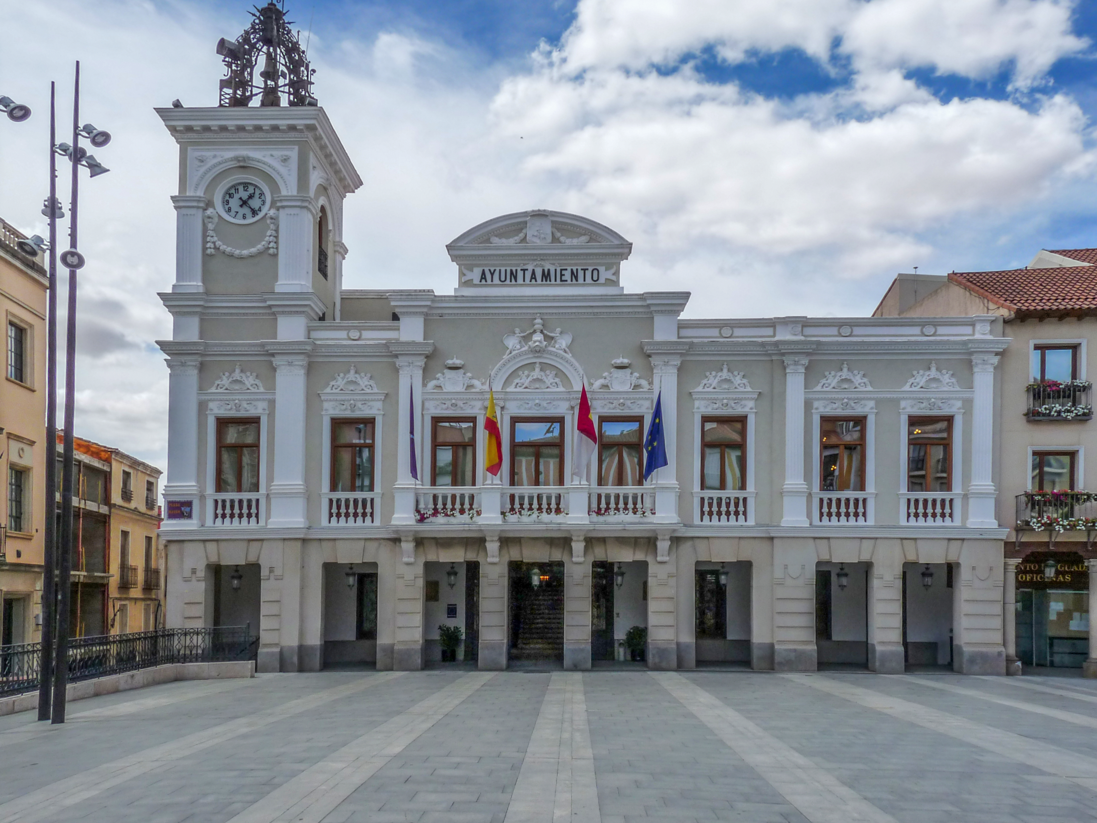 Gemeentehuis van Guadalajara